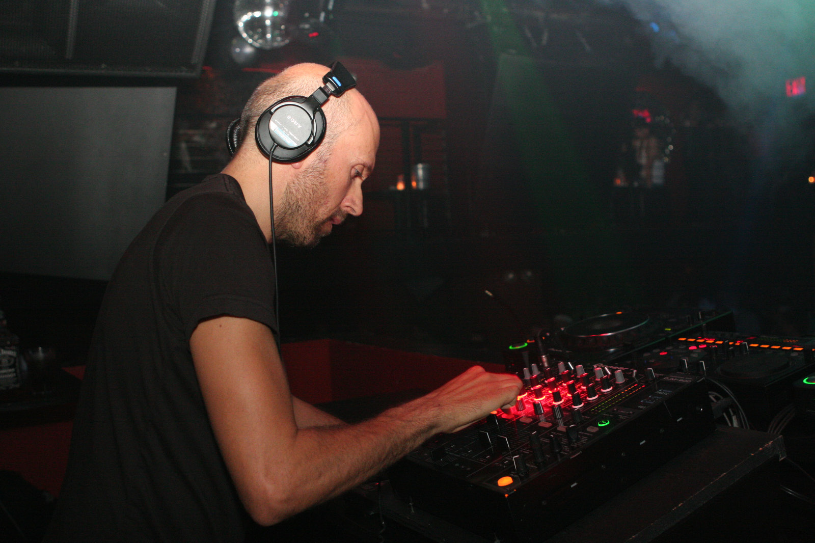 2006-09-29 Holden & Burridge @ Pacha, NYC